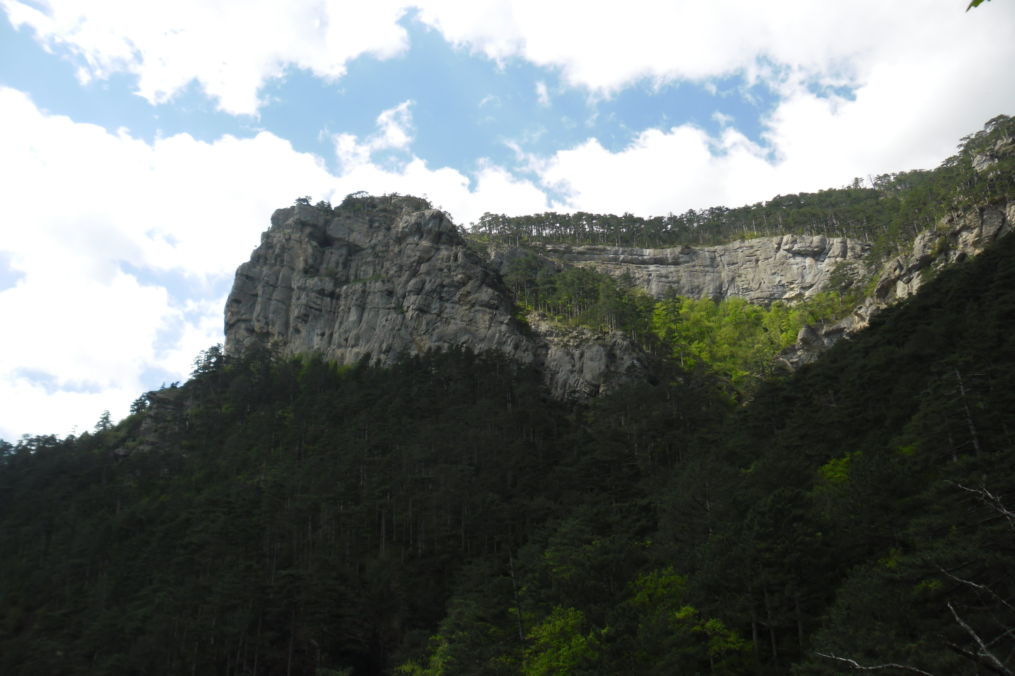 Ставрі-Кая